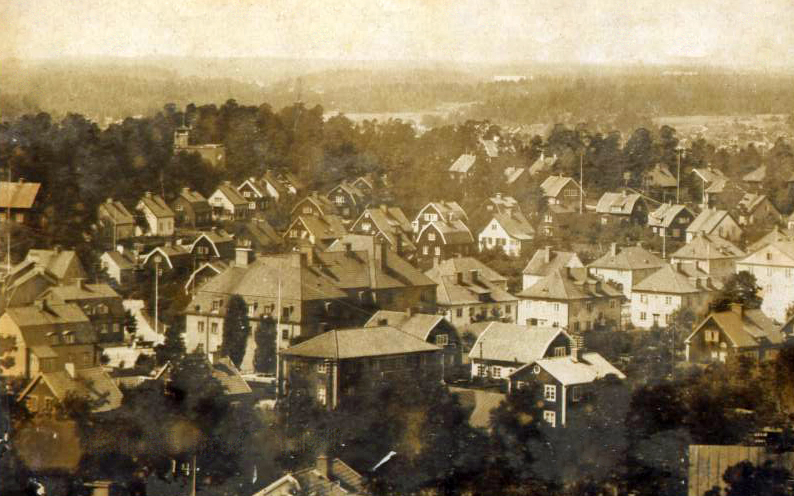 photos, sweden (Kungsholms Village, Sweden)